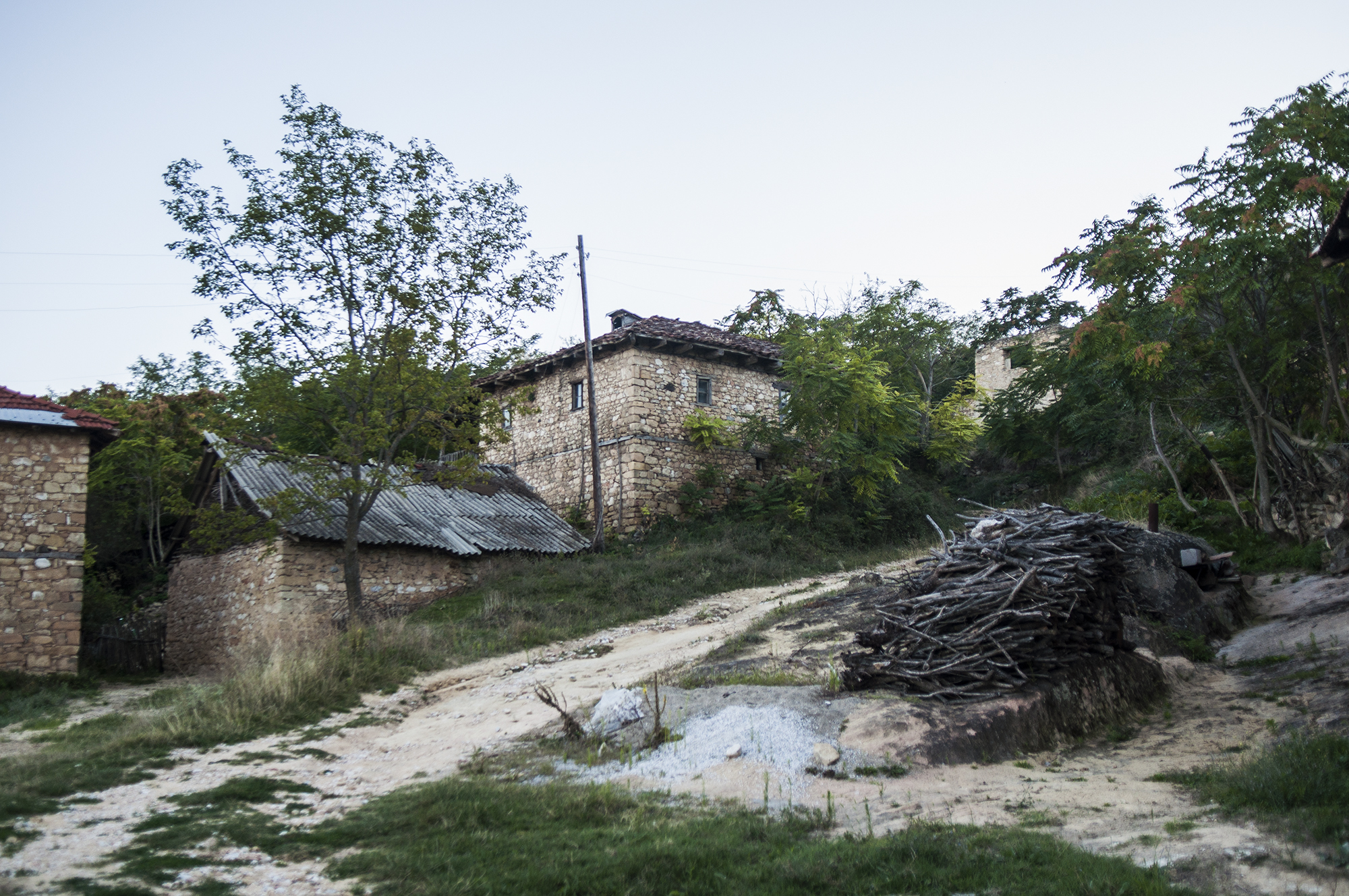 Интересна камена архитектура на куќите, повеќето се обраснати со зеленило.